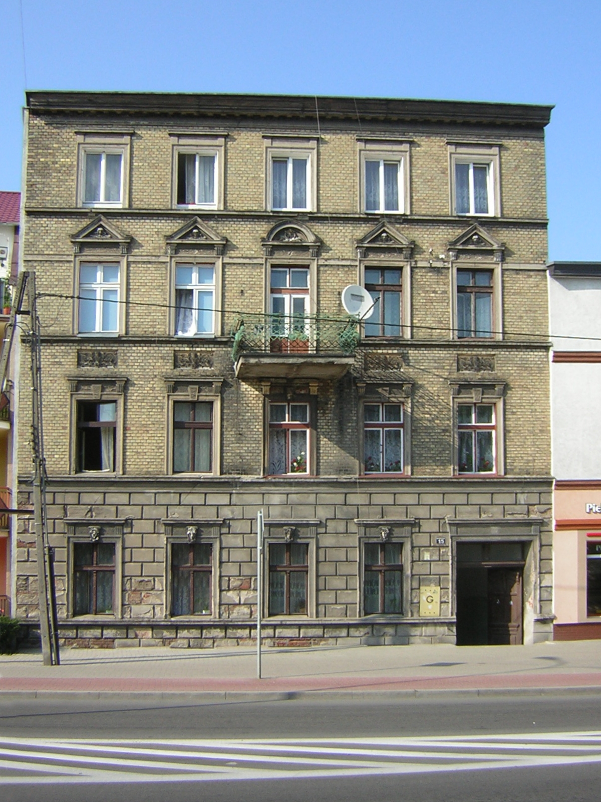 Iława, ul. Kościuszki 15 - kamienica neorenesansowa (zabytek nr 1543 z 18.03.198)